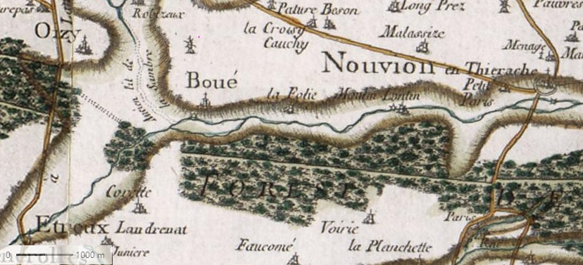 Le cours de l'Ancienne Sambre depuis la forêt du Nouvion jusqu'à Etreux et l'ancien cours de la Sambre, avant la capture de l'Ancienne Sambre par l'Oise, indiqué entre Boué et Oizy.